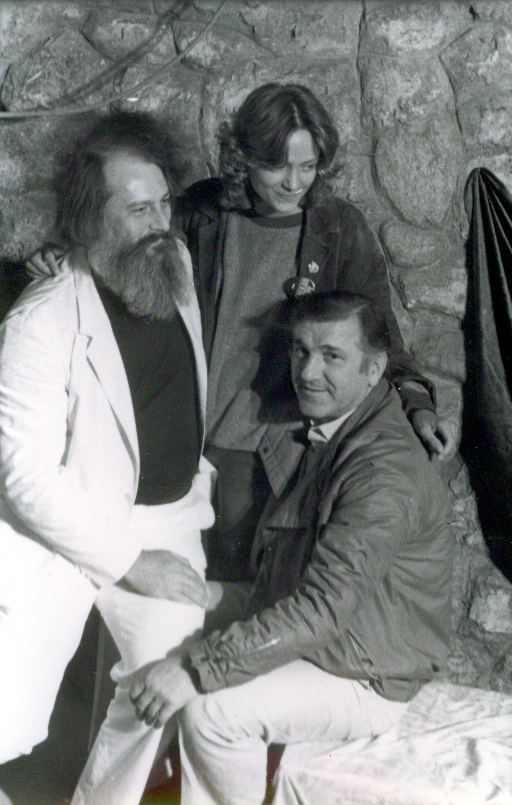 Ekipa filma "Šećerna vodica" na Filmskim susretima u Nišu 1984. godine - Sonja Savić, Bata Živoinović i režiser Svetislav Bata Prelić